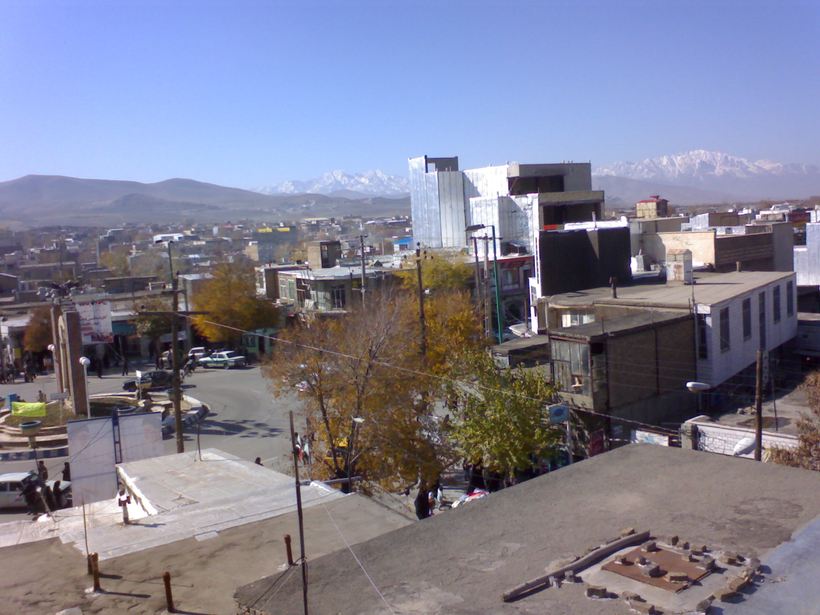 عکاس : میثم ابراهیمی